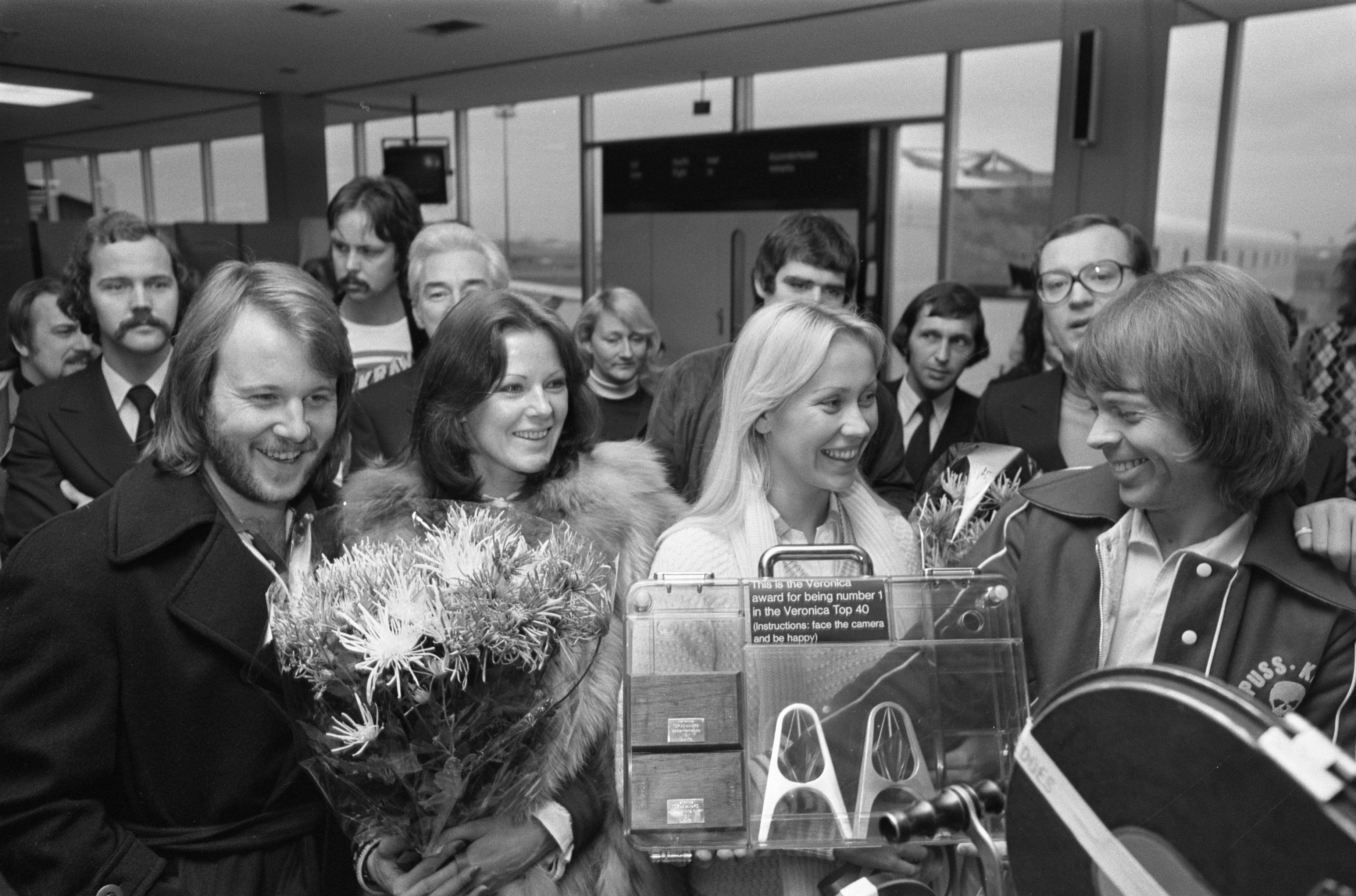 Collectie / Archief : Fotocollectie Anefo Reportage / Serie : [ onbekend ] Beschrijving : Zweedse popgroep ABBA in Nederland; v.l.n.r. Benny, Anni-Frid, Agnetha en Bjorn op Schiphol Datum : 19 november 1976 Locatie : Noord-Holland, Schiphol Trefwoorden : muziek, persconferenties, popgroepen, vliegvelden Persoonsnaam : ABBA, Andersson, Benny, Fältskog, Agnetha, Lyngstad, Anni-Frid, Ulvaues, Bjorn Fotograaf : Verhoeff, Bert / Anefo Auteursrechthebbende : Nationaal Archief Materiaalsoort : Negatief (zwart/wit) Nummer archiefinventaris : bekijk toegang 2.24.01.05 Bestanddeelnummer : 928-8962